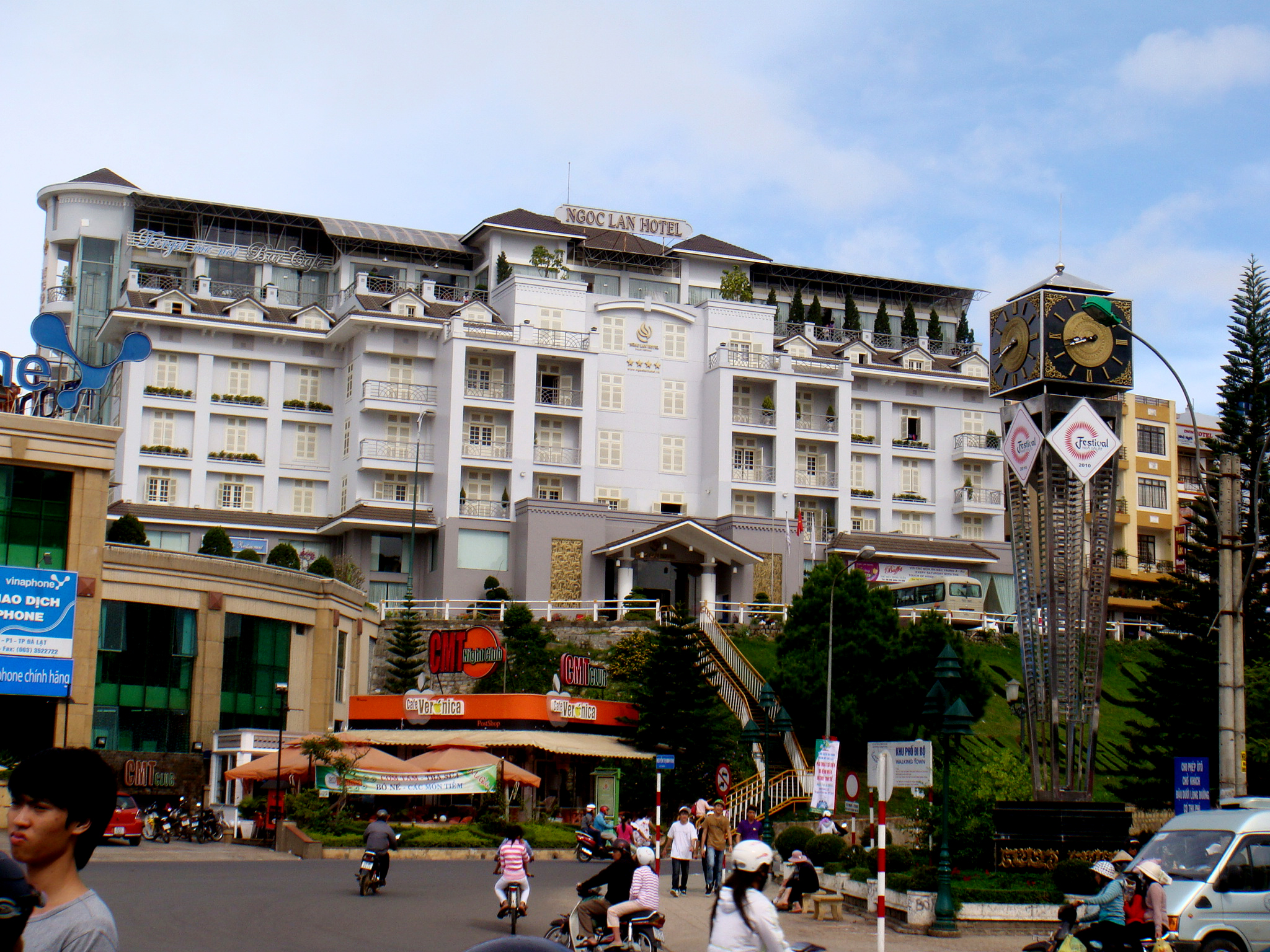 Dalat Plaza